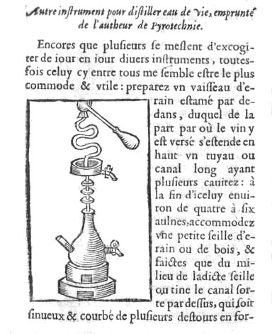 Appareil de distillation, Jean Liébault 1535-1596